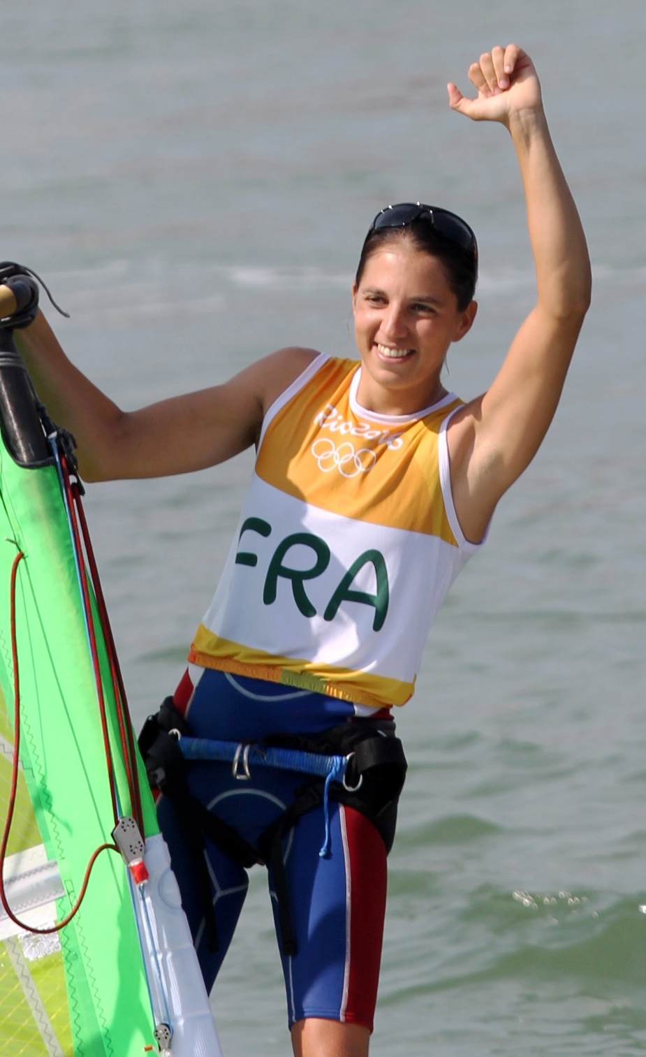 Charline Picon Médaille d'OR aux Jeux Olympiques de Rio à La Rochelle le 27 août 2016- France